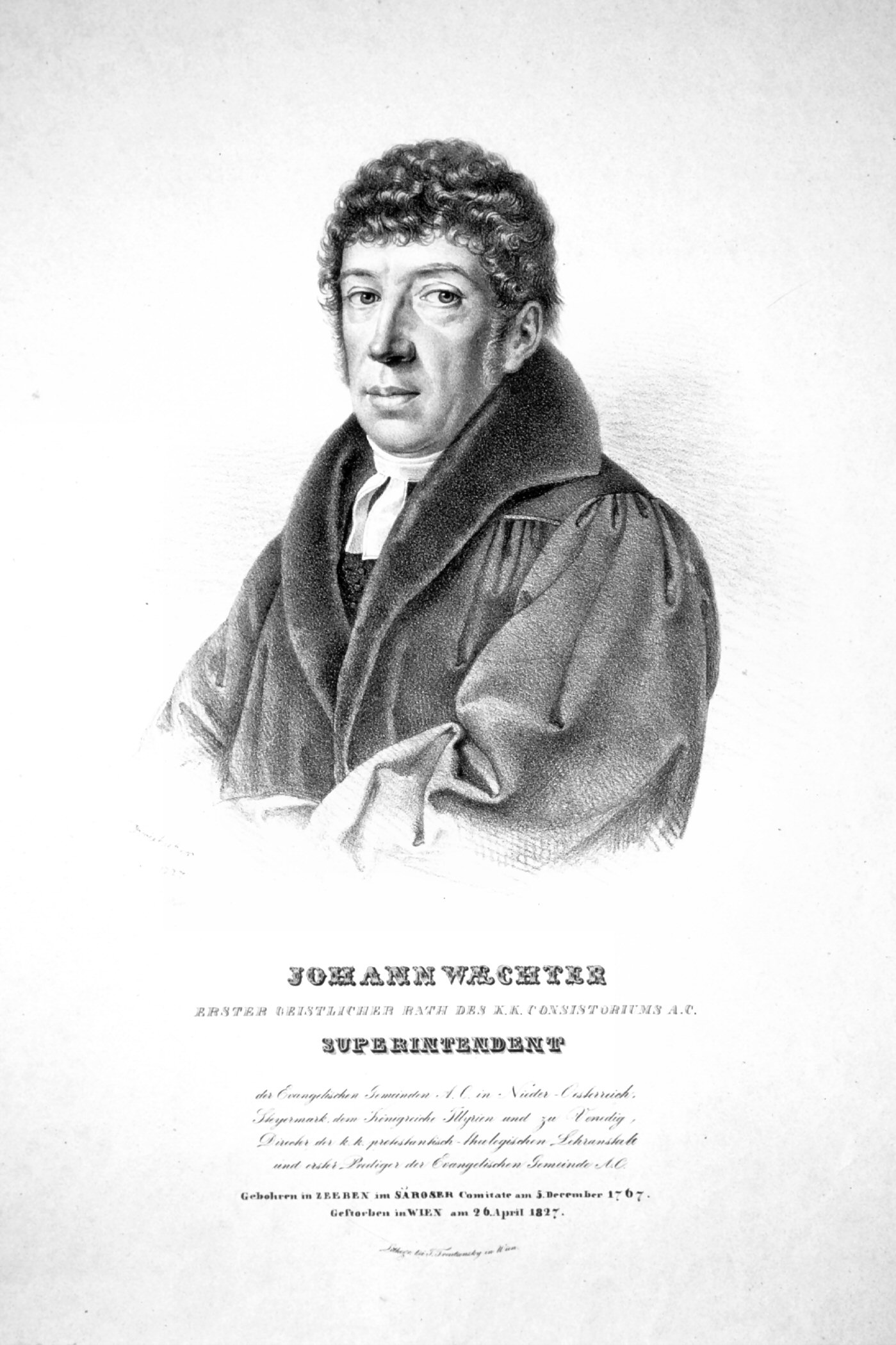 Johann Waechter (1767-1827) evangelischer Superintendent; Lithographie von Josef Kriehuber, 1827